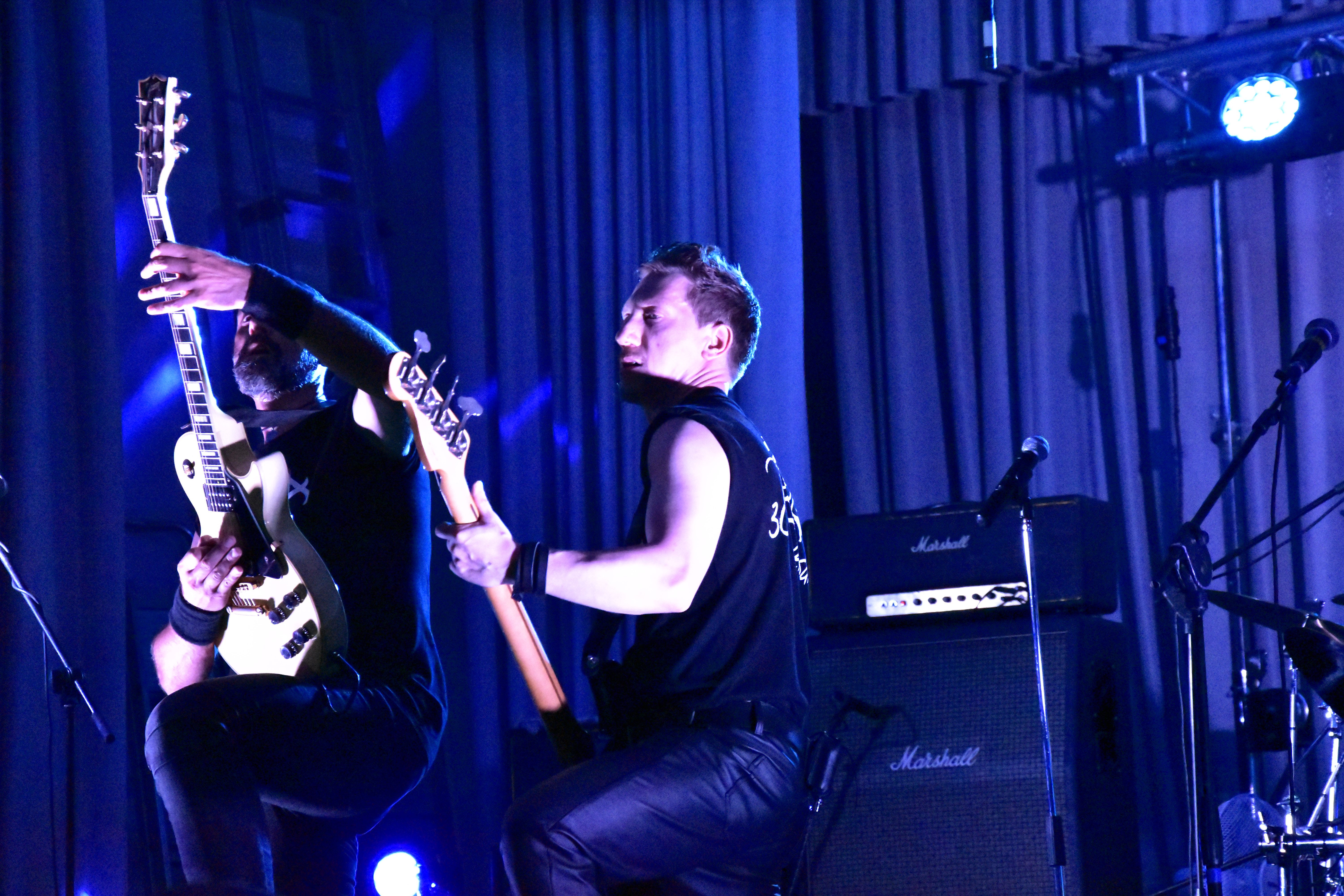 Live in Caramagna 2019 - 30th Years